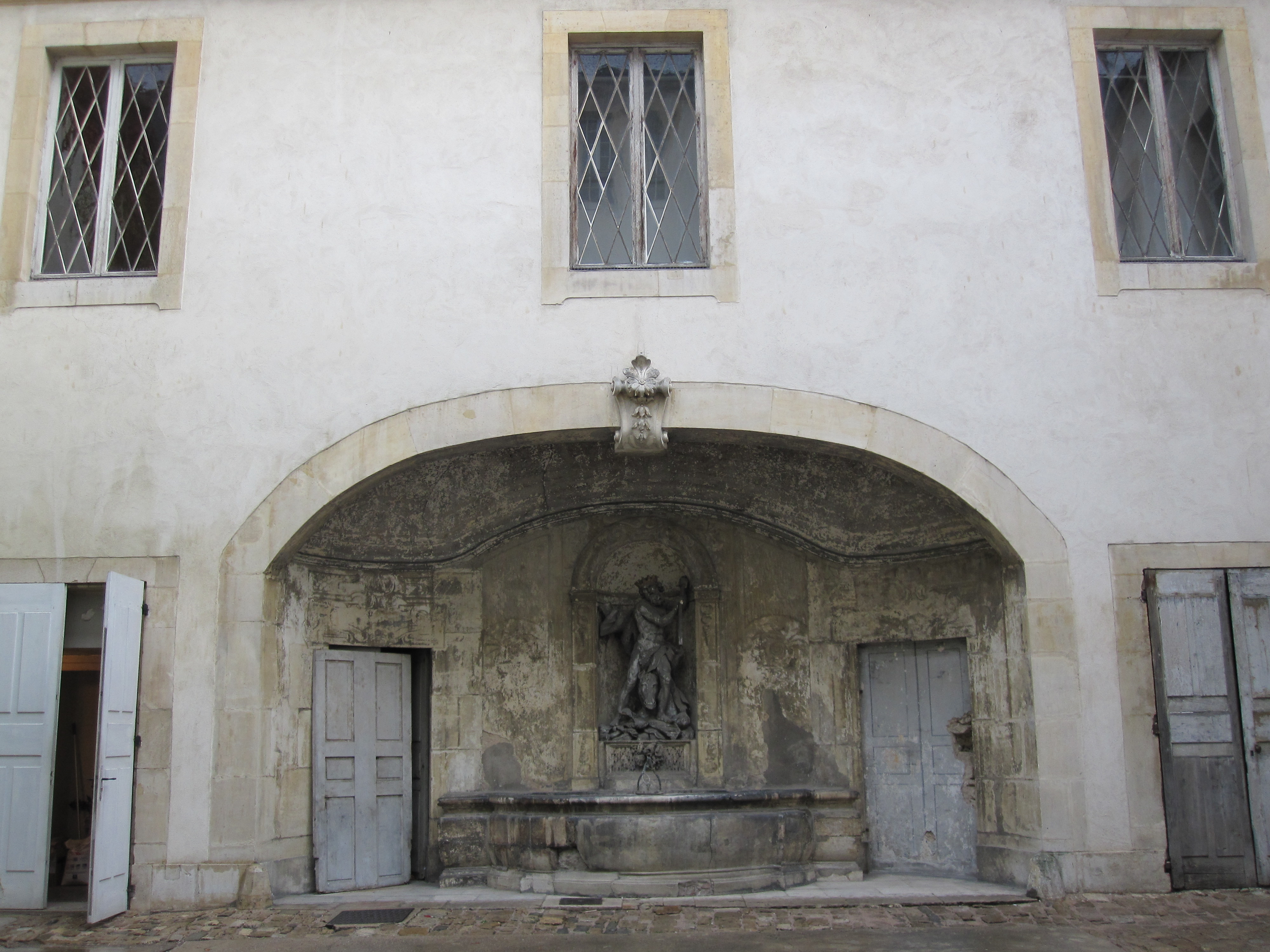 54 Nancy Hôtel de Ferraris fontaine de Neptune